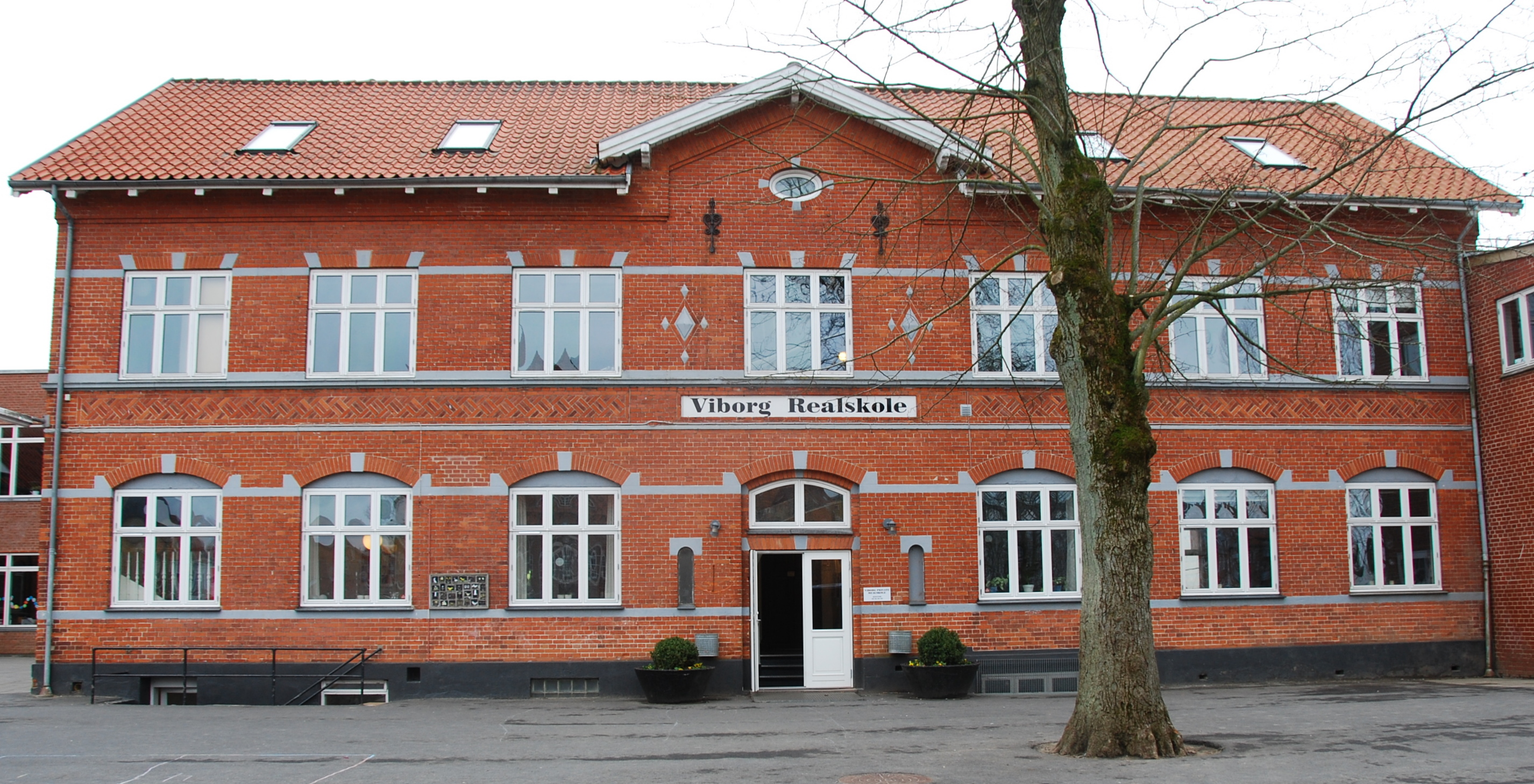 Hovedbygningen på Viborg Private Realskole.